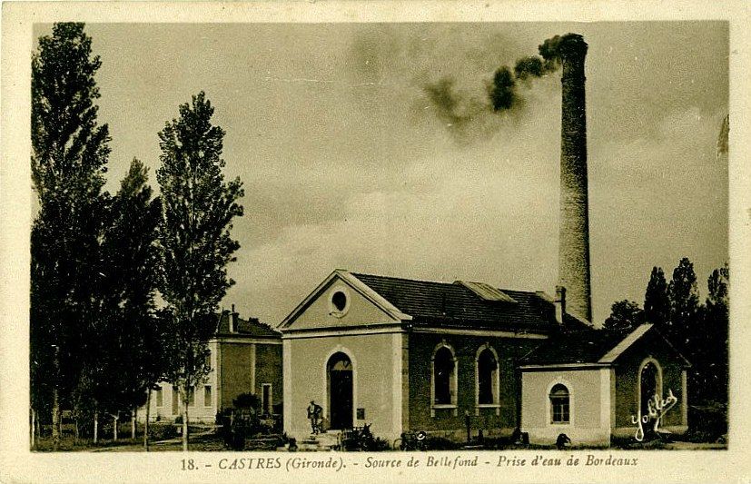 Castres source Bellefond